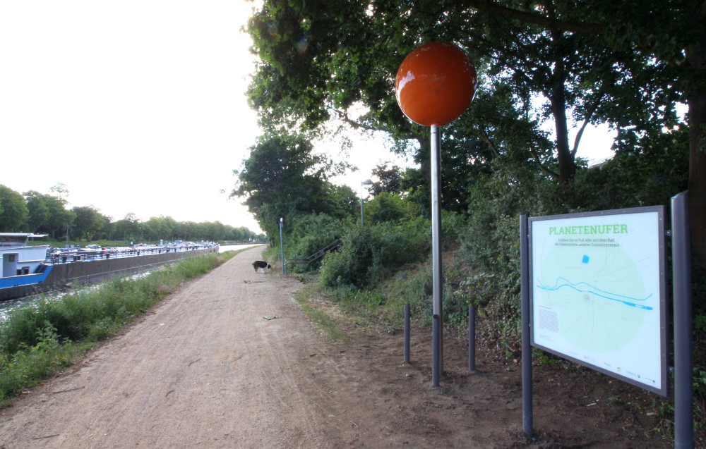 Startpunkt des Planetenweges in Dorsten/NRW